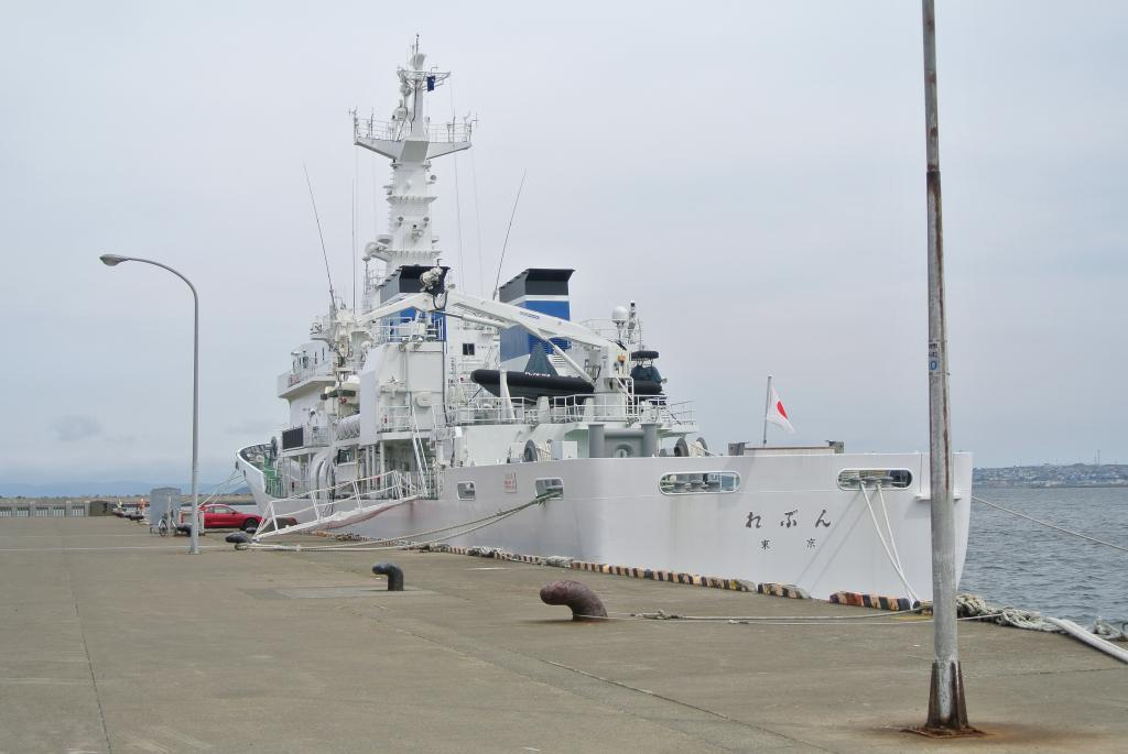 稚内に停泊する巡視船「れぶん」。